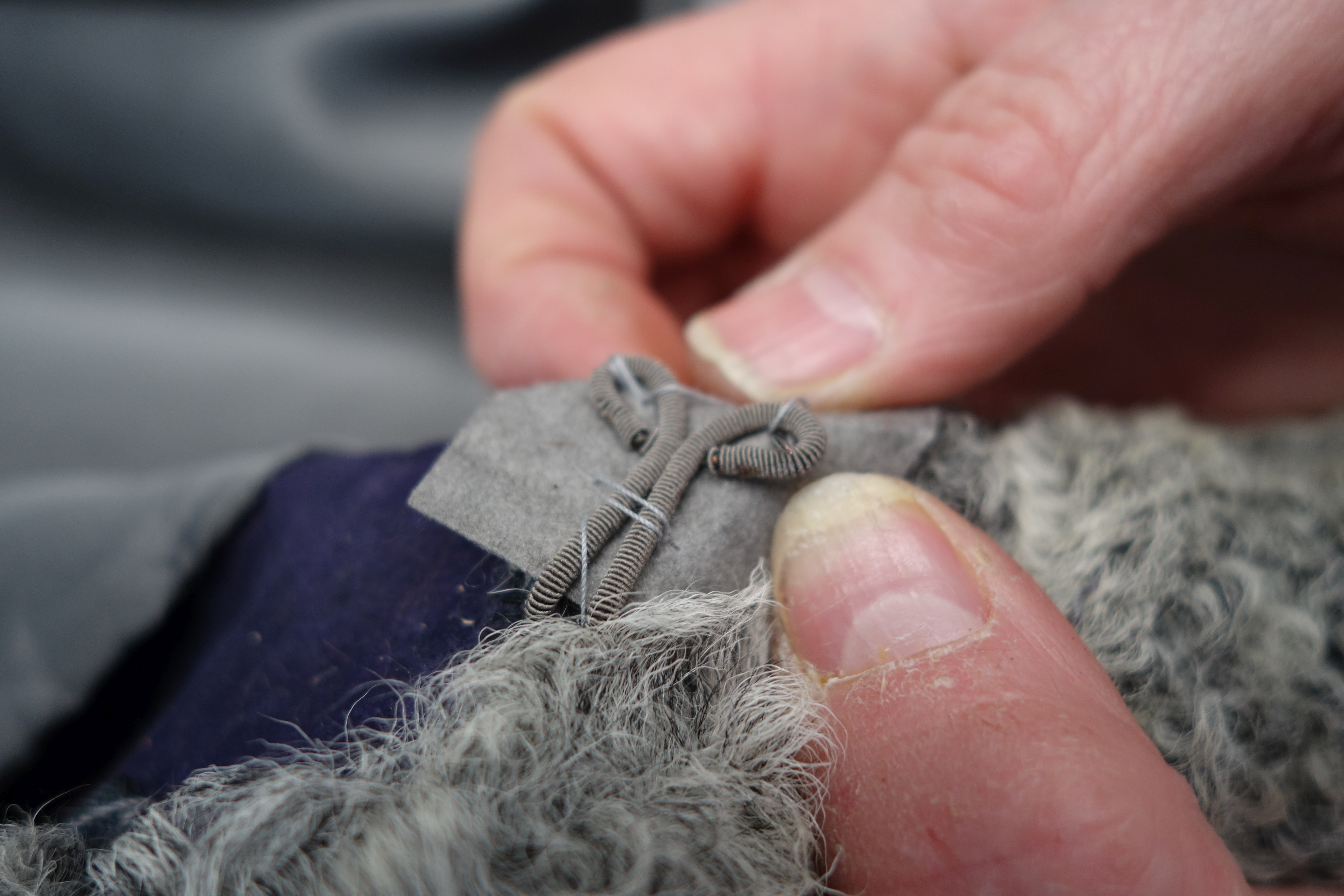 Annähen eines Pelzhakens (Hochverschluss). Gesehen im Atelier der Firma Halfmann Pelzmanufaktur GmbH., Düsseldorf-Oberkassel.